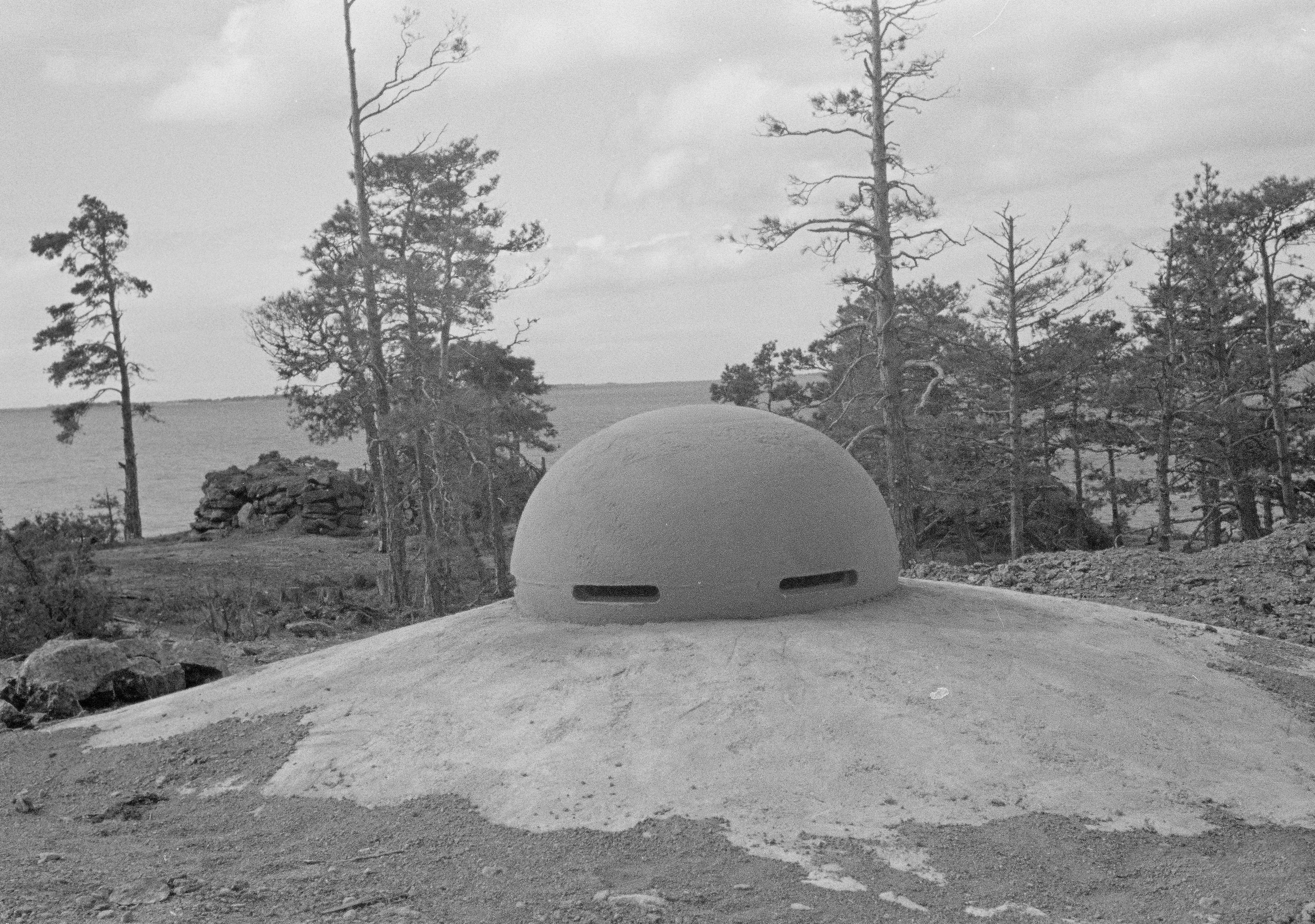 Kallioon kaivetun keskustulenjohtotunnelin "silmä".